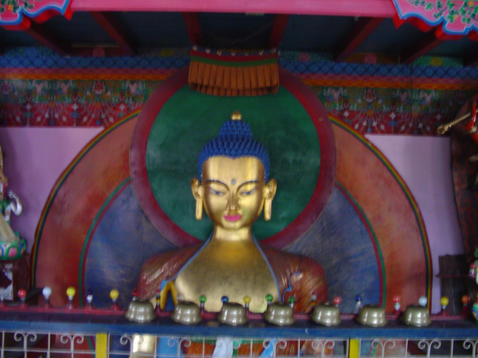 Himalayalar, Manali'de Tibet Niyingma koluna ait bir budist tapinakta Buda heykeli